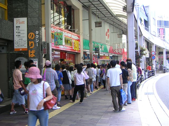 撮影：2005年8月6日 サンキューマート鹿児島店